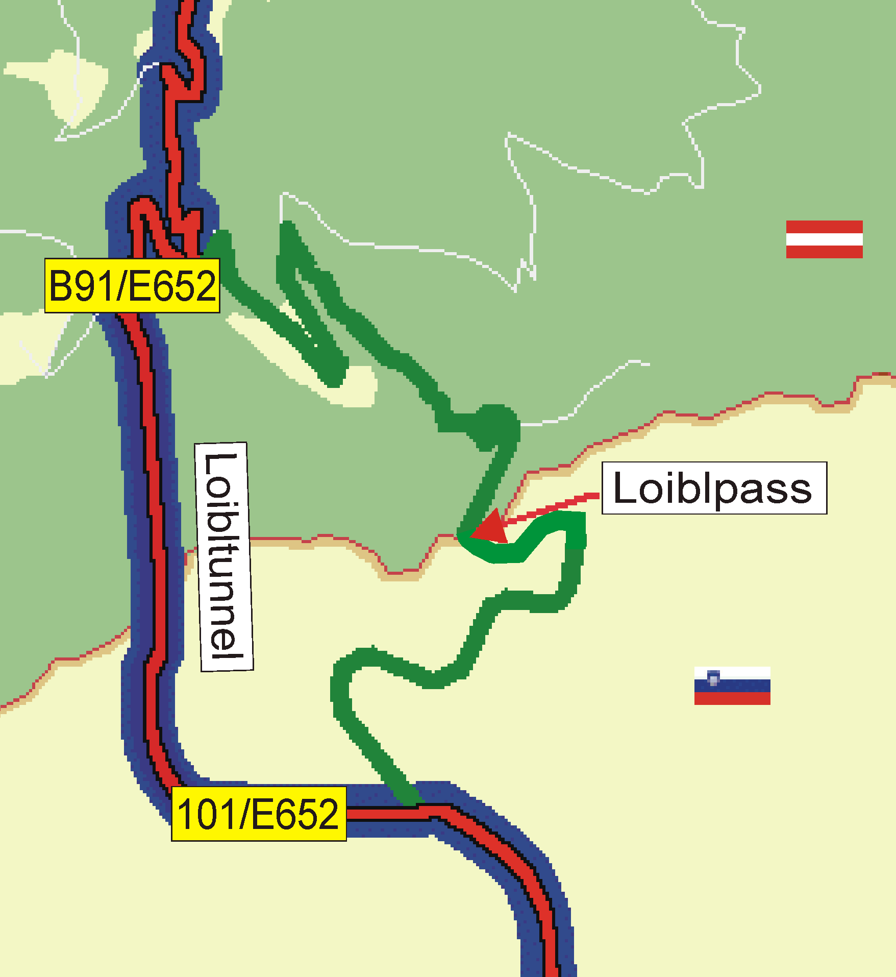 Karte Loiblpass und Loibltunnel Fotograf: presse03, selbst erstellt 2005 Lizenz: GNU-FDL